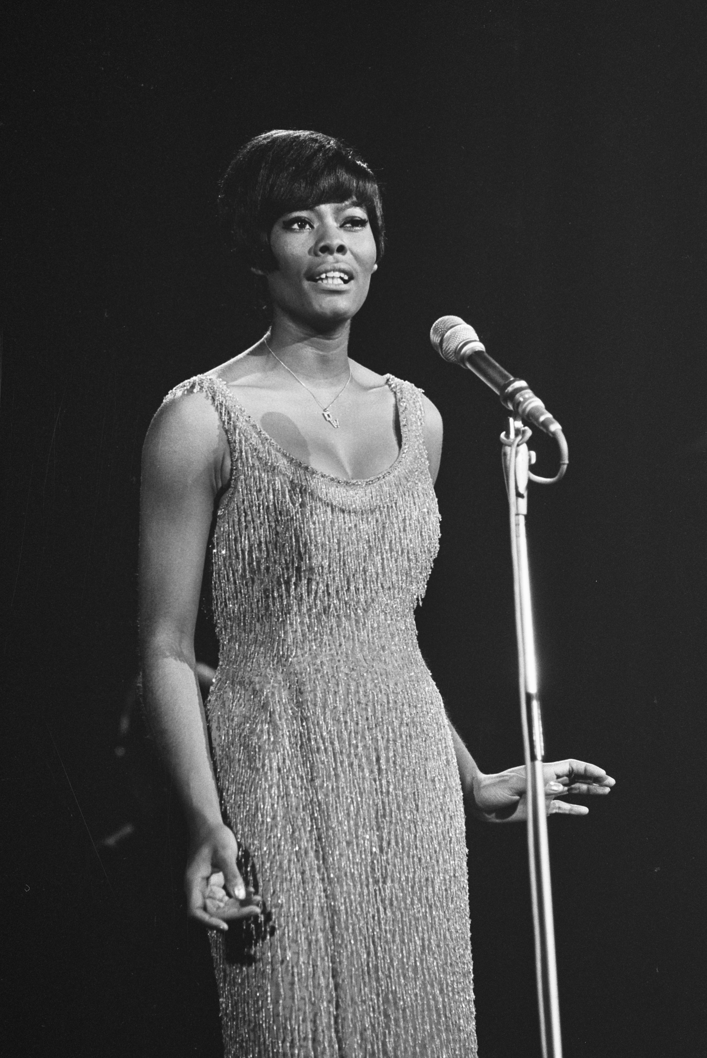 Collectie / Archief : Fotocollectie Anefo Reportage / Serie : Grand Gala du Disque in het concertgebouw te Amsterdam Beschrijving : Optreden van de Amerikaanse zangeres Dionne Warwick Datum : 2 oktober 1966 Locatie : Amsterdam, Noord-Holland Trefwoorden : zangeressen Persoonsnaam : Warwick, Dionne Fotograaf : Fotograaf Onbekend / Anefo Auteursrechthebbende : Nationaal Archief Materiaalsoort : Negatief (zwart/wit) Nummer archiefinventaris : bekijk toegang 2.24.01.05 Bestanddeelnummer : 919-6271 Reacties Geplaatst door Geschiedenismens - Muziek op 26 november 2017 - 21:44. Grand Gala du Disque Populaire in het RAI congrescentrum Datum: 01 oktober 1966 (locatie Concertgebouw is onjuist en datum 2 oktober is onjuist)